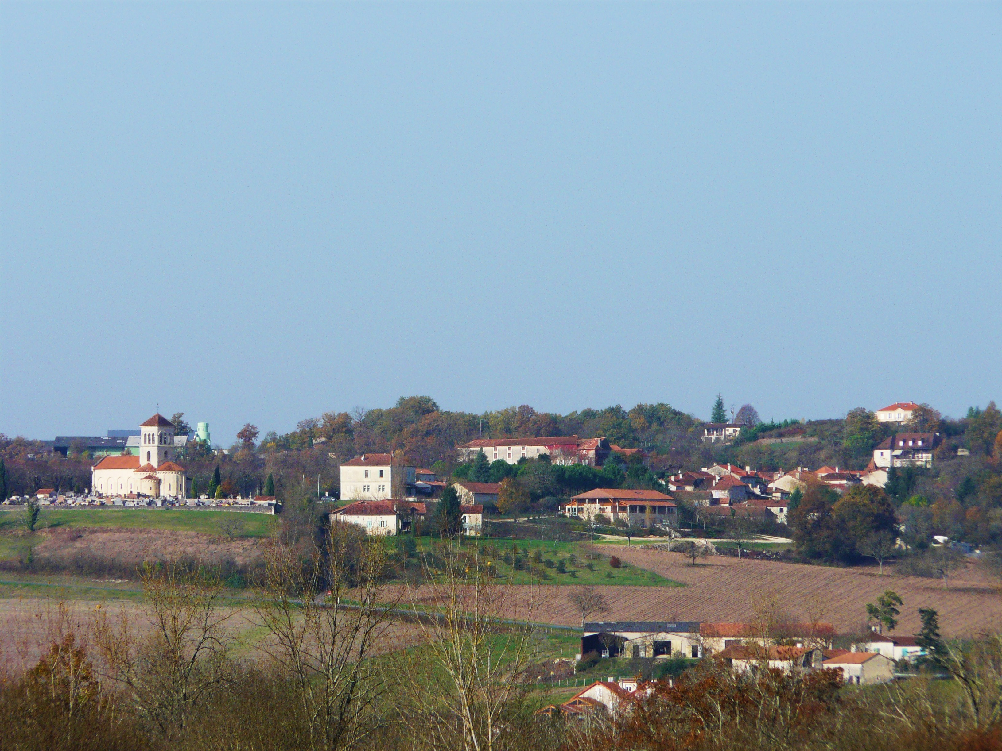 Le bourg de Montagrier vu depuis le sud-est, Dordogne, France